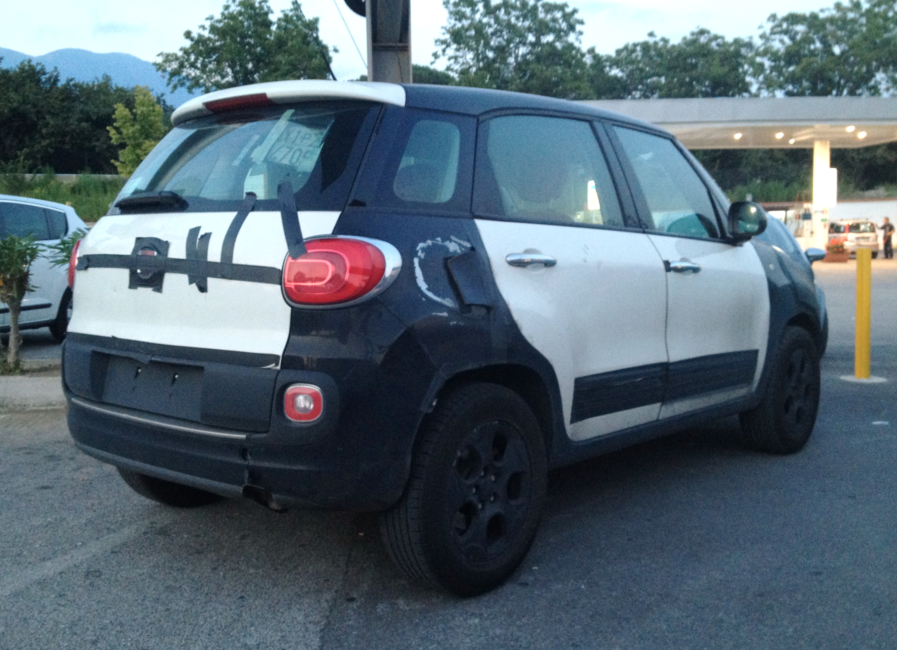 Prototipo di Fiat 500X-Jeep Renegade (B-SUV) basato su una Fiat 500L, possibile versione a metano (Natural Power) fotografato presso la pompa di gas GPL/Metano ad Avella (Avellino), forse ipotetica versione a trazione anteriore